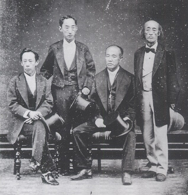 高須四兄弟。左から松平定敬、松平容保、一橋茂栄(徳川茂徳)、徳川慶勝。